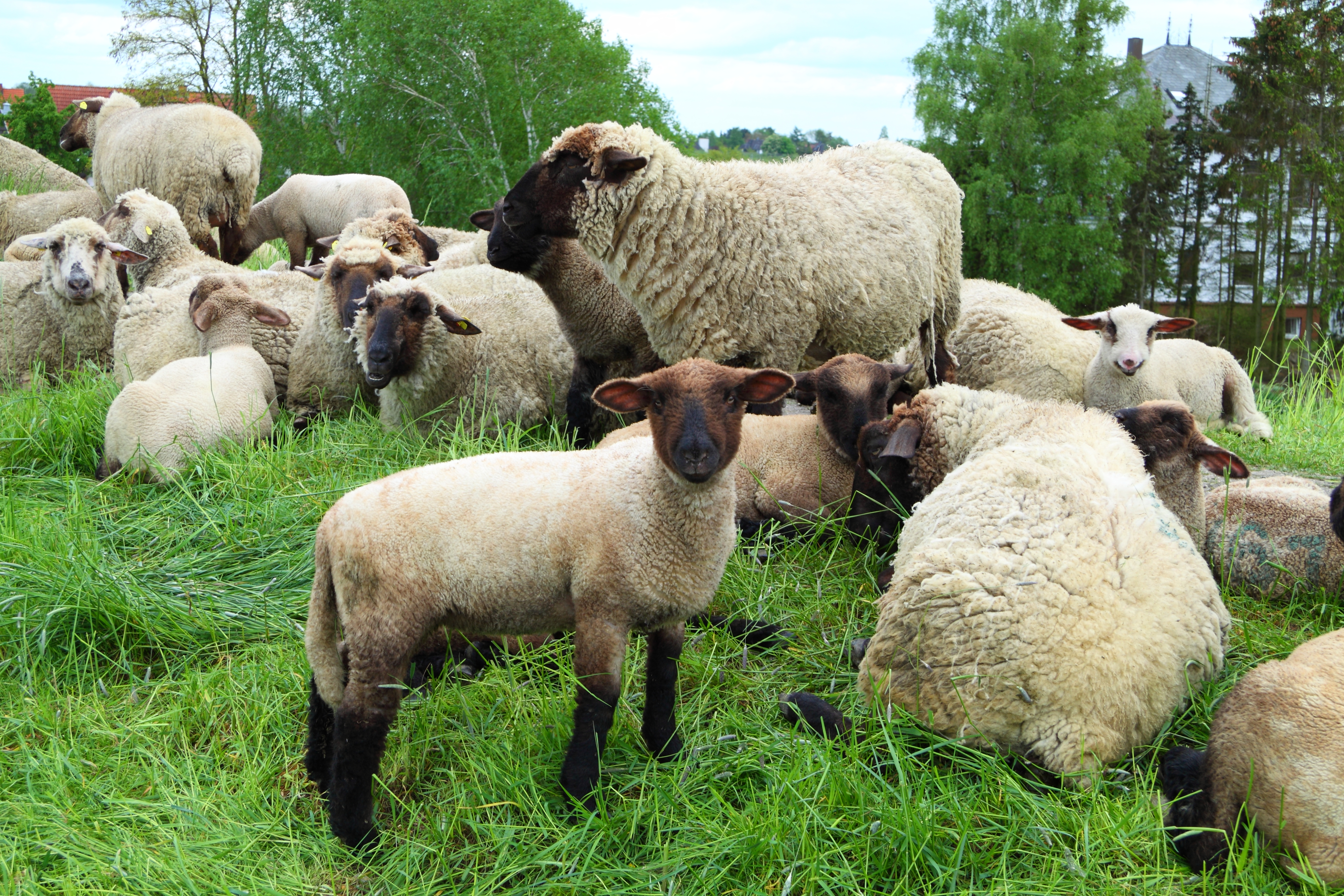 Grazing sheep on the levee in Grünendeich